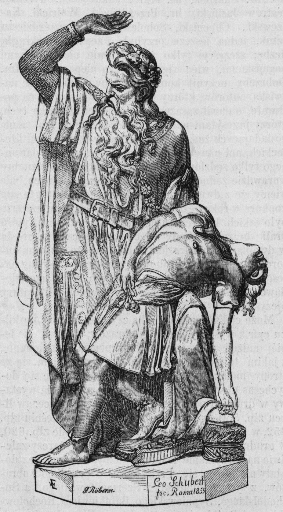 Rzeźbę Leona Szuberta Przekleństwo śpiewaka rysował Eliasz z Krakowa, natomiast rytował G. Rober w drzeworytni „Tygodnika Ilustrowanego”. Skan rzeźby z nr 16 z 14 stycznia 1860 r. z „Tygodnika Ilustrowanego” wykonał Andrzej Kobrzyski z Uniwersytetu Mikołaja Kopernika w Toruniu.